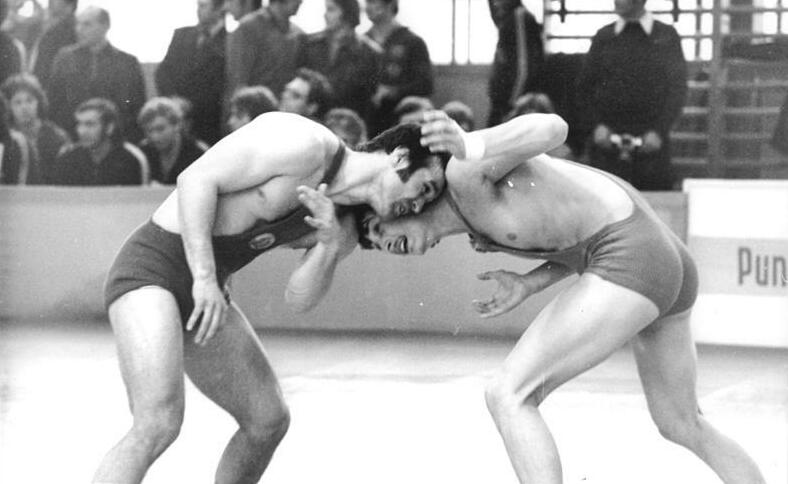 Klaus-Peter Göpfert, Andreas Schelzig ADN-ZB Schaar 23.4.1977 DDR-Meisterschaften im Ringen - klassischer Stil in Zella-Mehlis Klaus-Peter Göpfert (links-SC Zella-Mehlis) besiegte Andreas Schelzig (SCL)